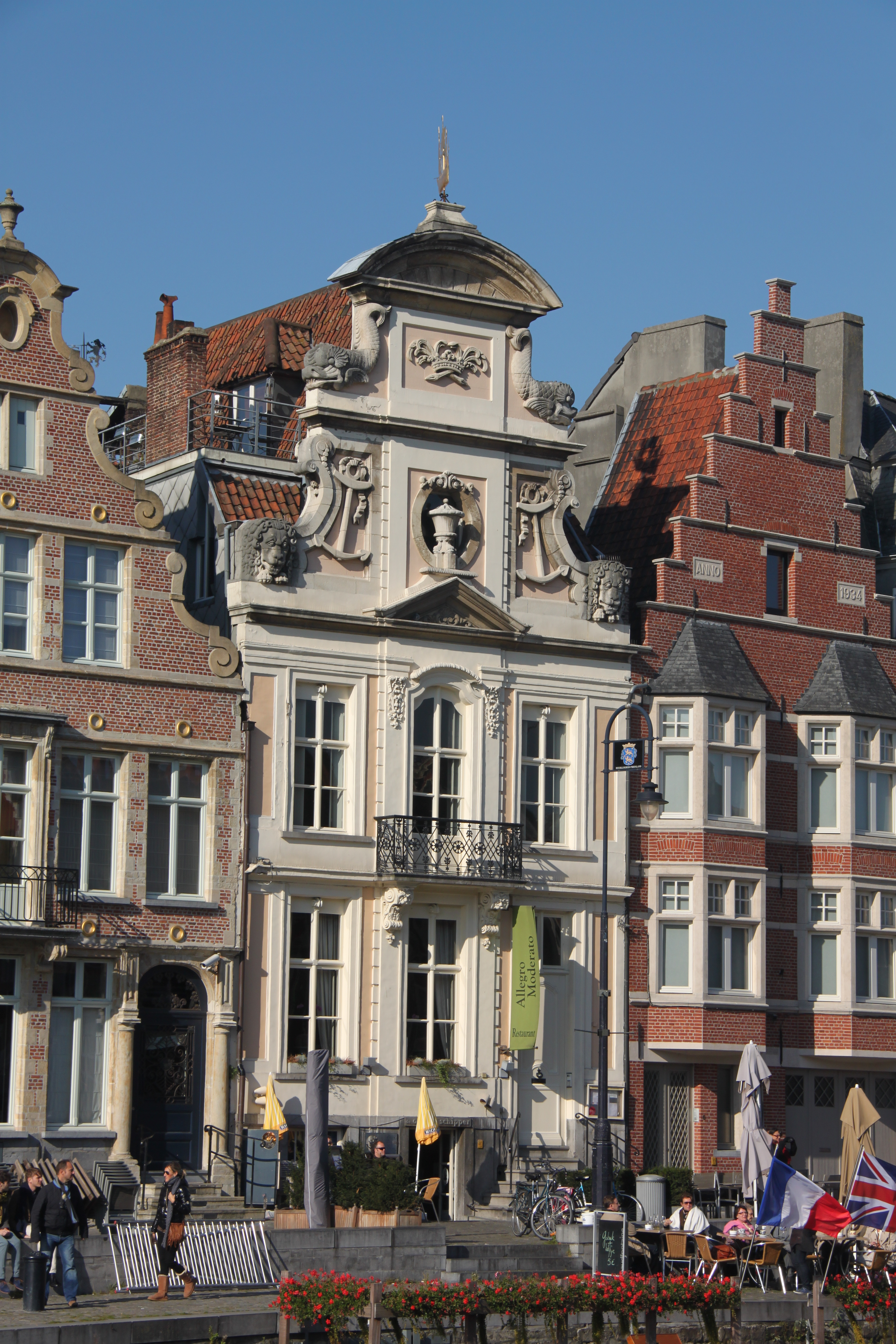 2011-10-23 in Ghent